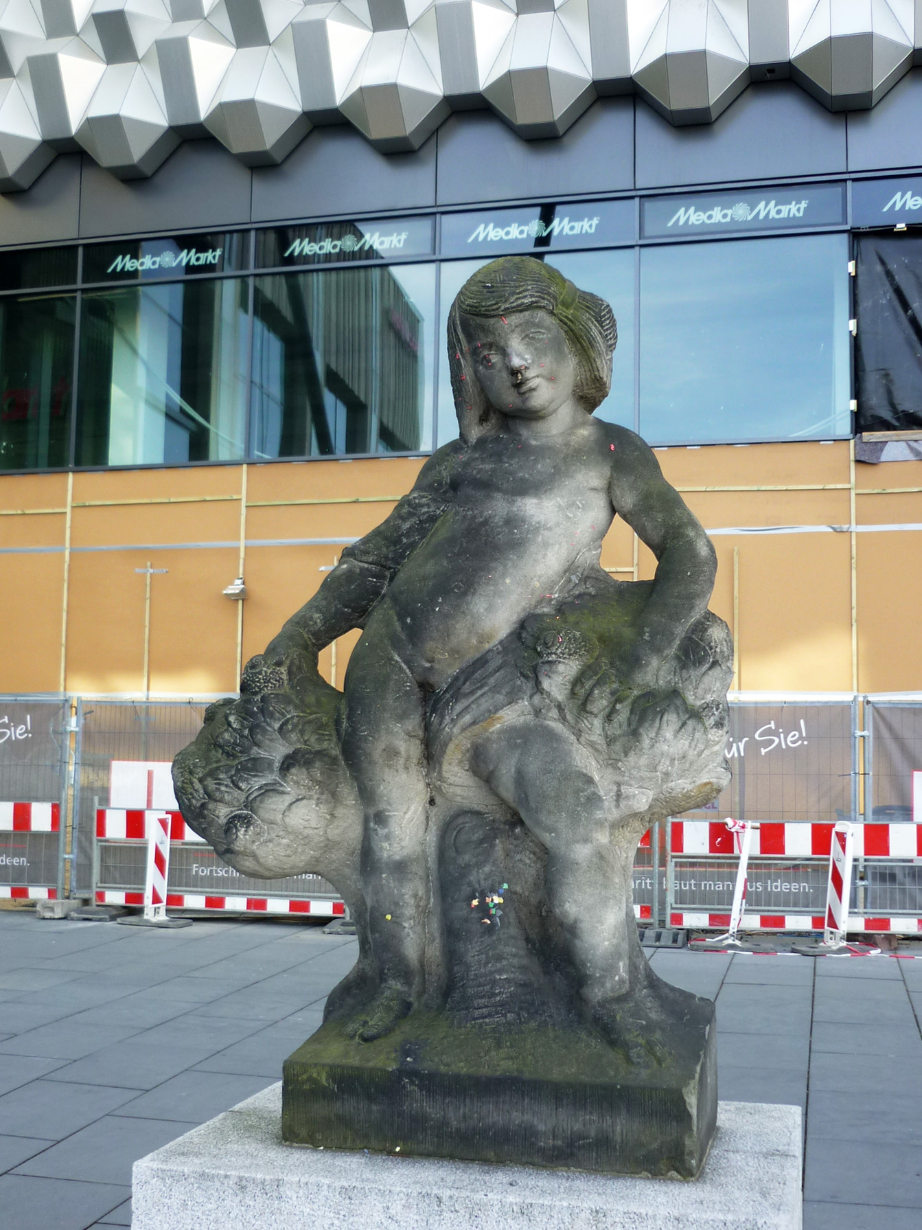 Sandsteinskulpturen vom ehem. Trompeterschlösschen am Dioppoldiswalder Platz in Dresden (von Paul Polte, vom Anf. des 20. Jhdts., 2009 restauriert und wiederaufgestellt an der Trompetergasse)